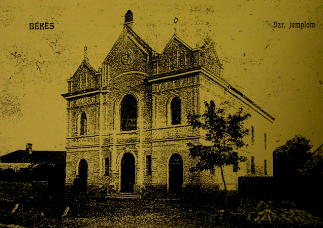 Bekes Synagogue. Listed ID 2377. - Ady Endre street, Bekes, Hungary